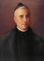 Retrato de San José Manyanet